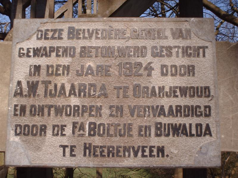 Belvedere Oranjewoud